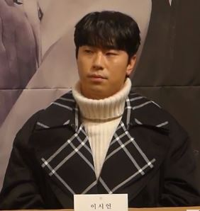 12일 오후 서울시 강남구 논현동 임피리얼팰리스서울에서 TV CHOSUN 특별기획 드라마 '간택-여인들의 전쟁' 제작발표회가 열려 배우 진세연 김민규 도상우 이열음 이시언이 참석해 기자들의 질문에 답변하고 있다.